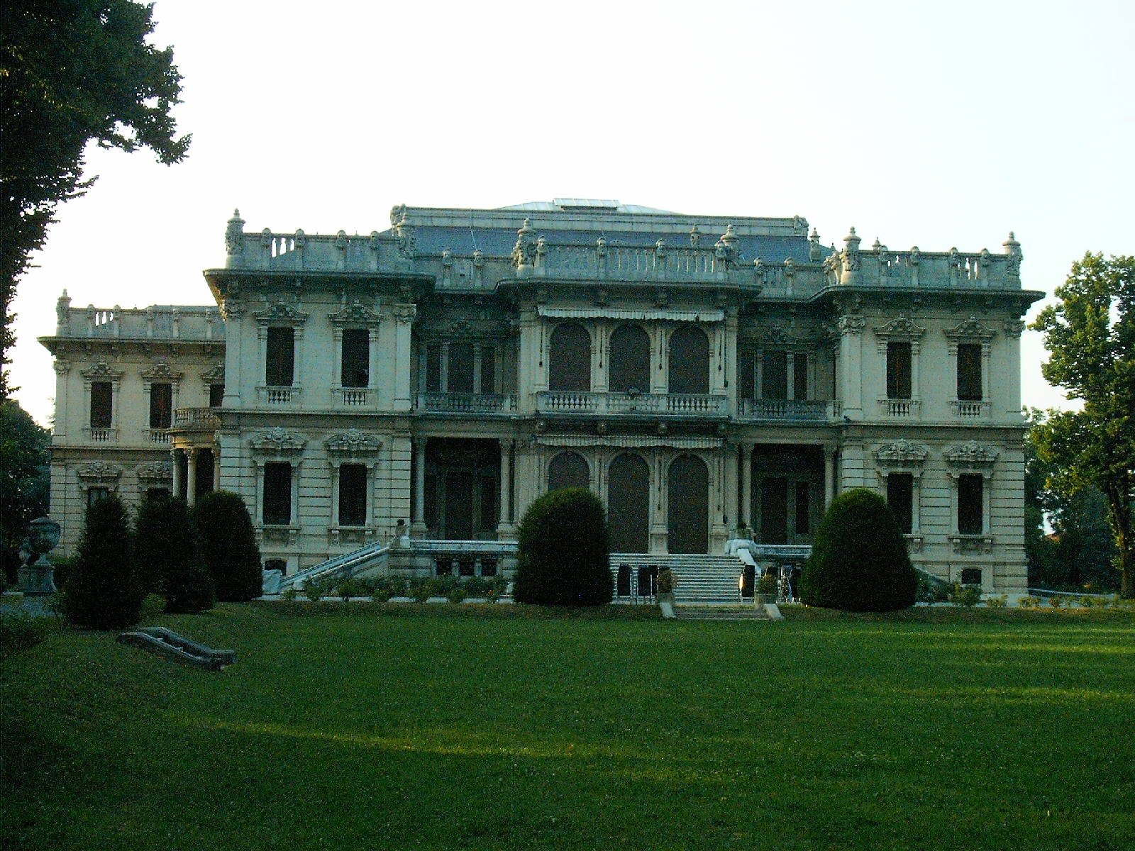 Villa Mazzotti, Chiari (BS), Italy